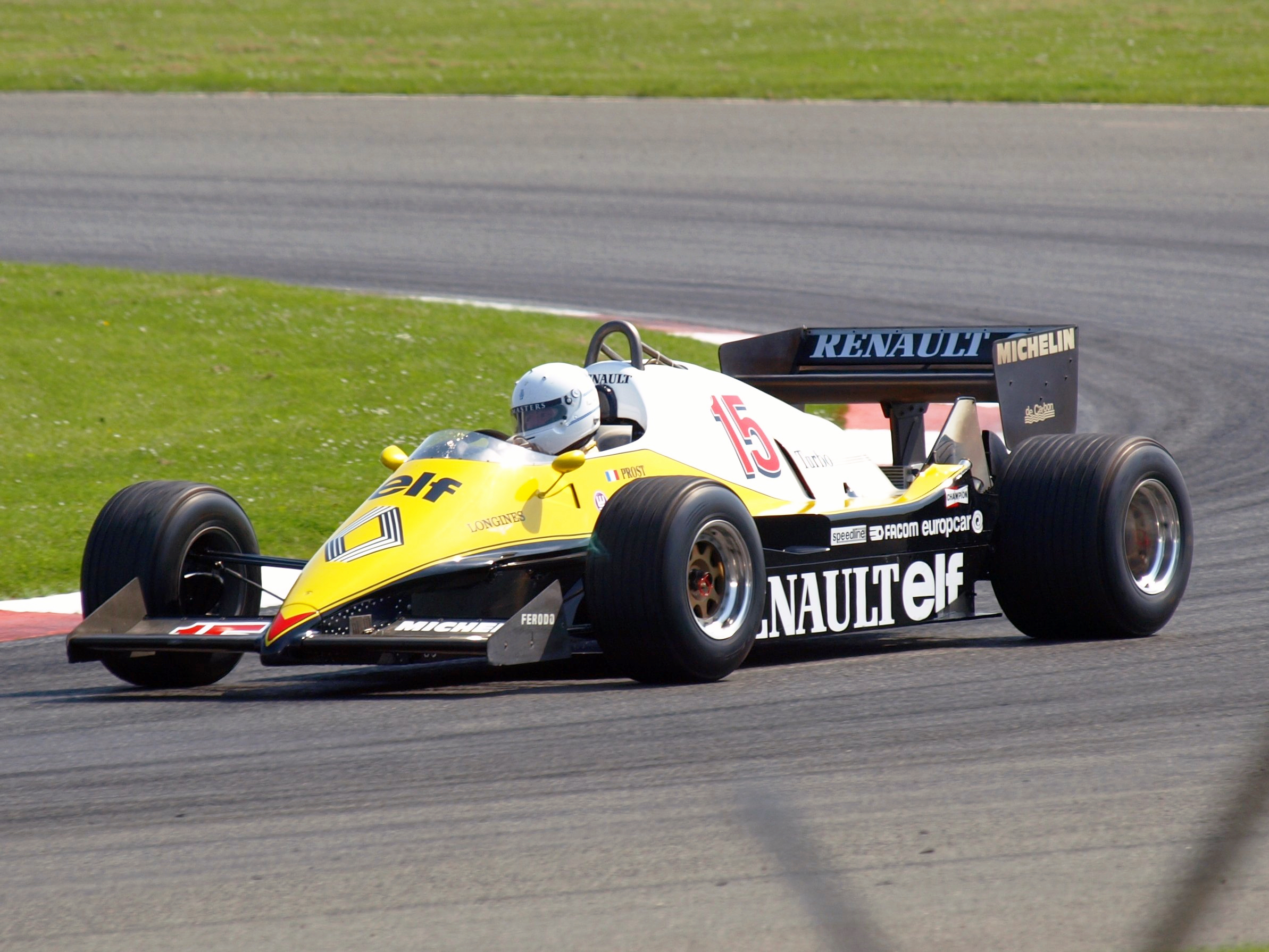 Renault RE40 Formula One car being driven in 200